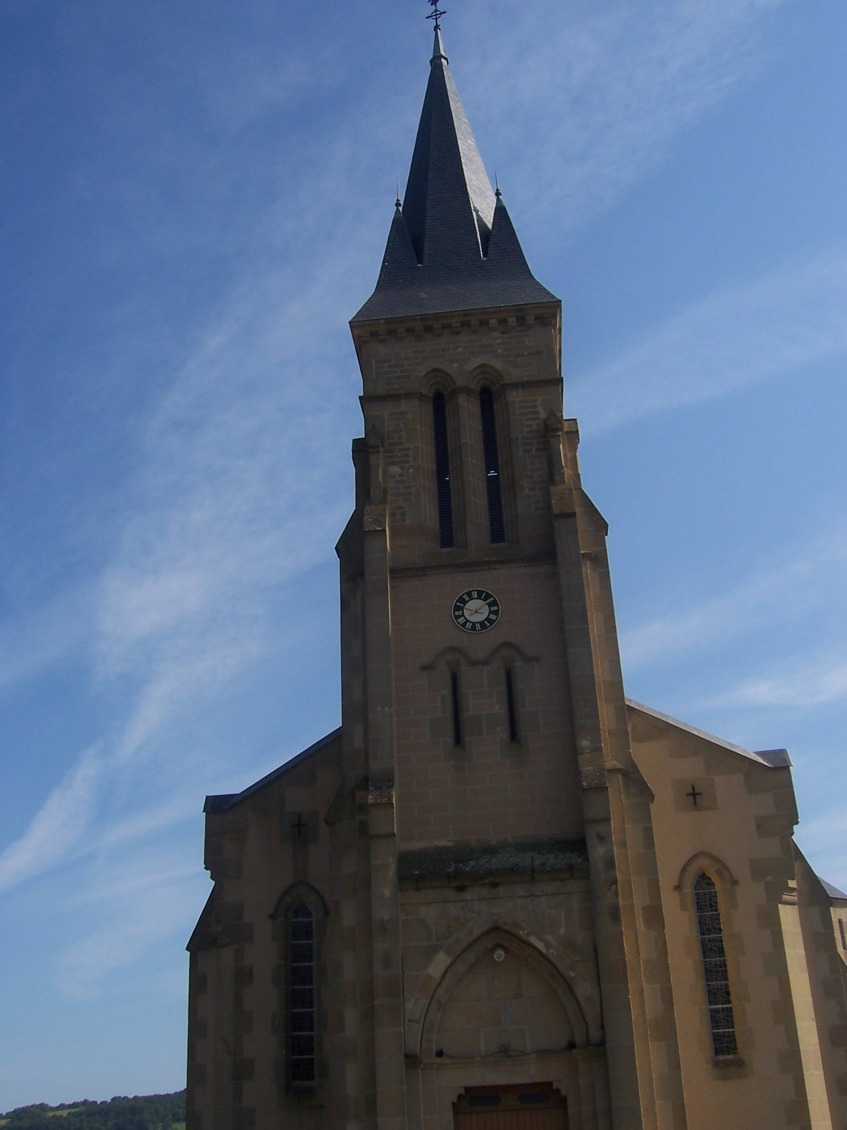 Eglise de Saint-Symphorien-de-Marmagne